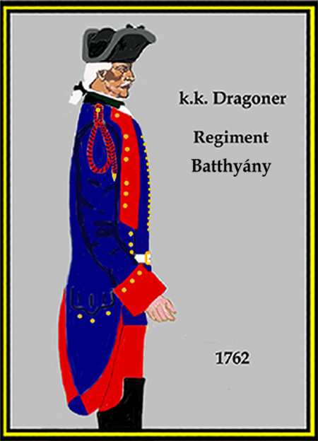 Österreichishes Dragoner-Regiment „Batthány“ 1762 (Aus: L.& F. Funcken - „L'Uniforme et les Armes des soldats de la guerre en dentelle II“) Castermann (Tournai 1976)